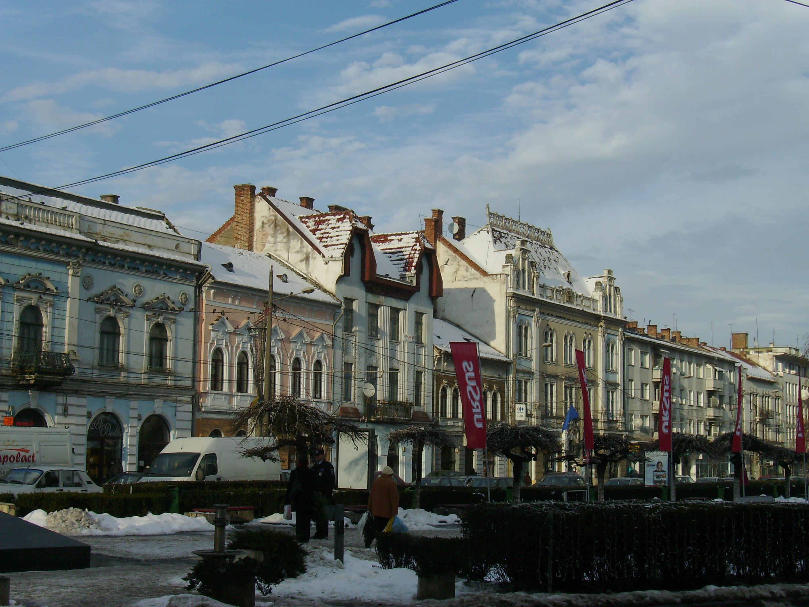 Piaţa Mihai Viteazu din Cluj-Napoca